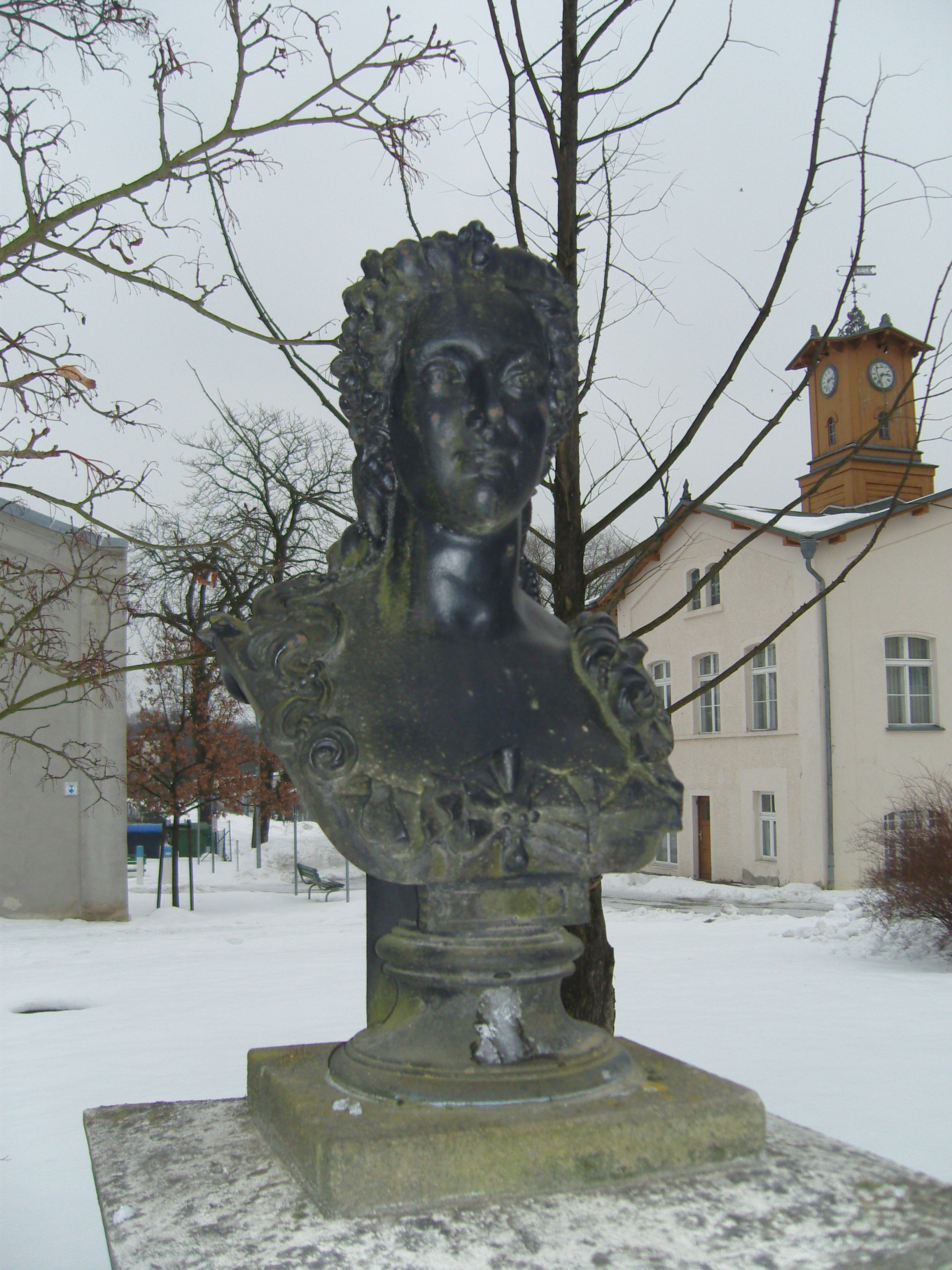 Büste der Freifrau Benedicta Margareta von Löwendal auf dem Gelände des ehemaligen Eisenwerks Lauchhammer